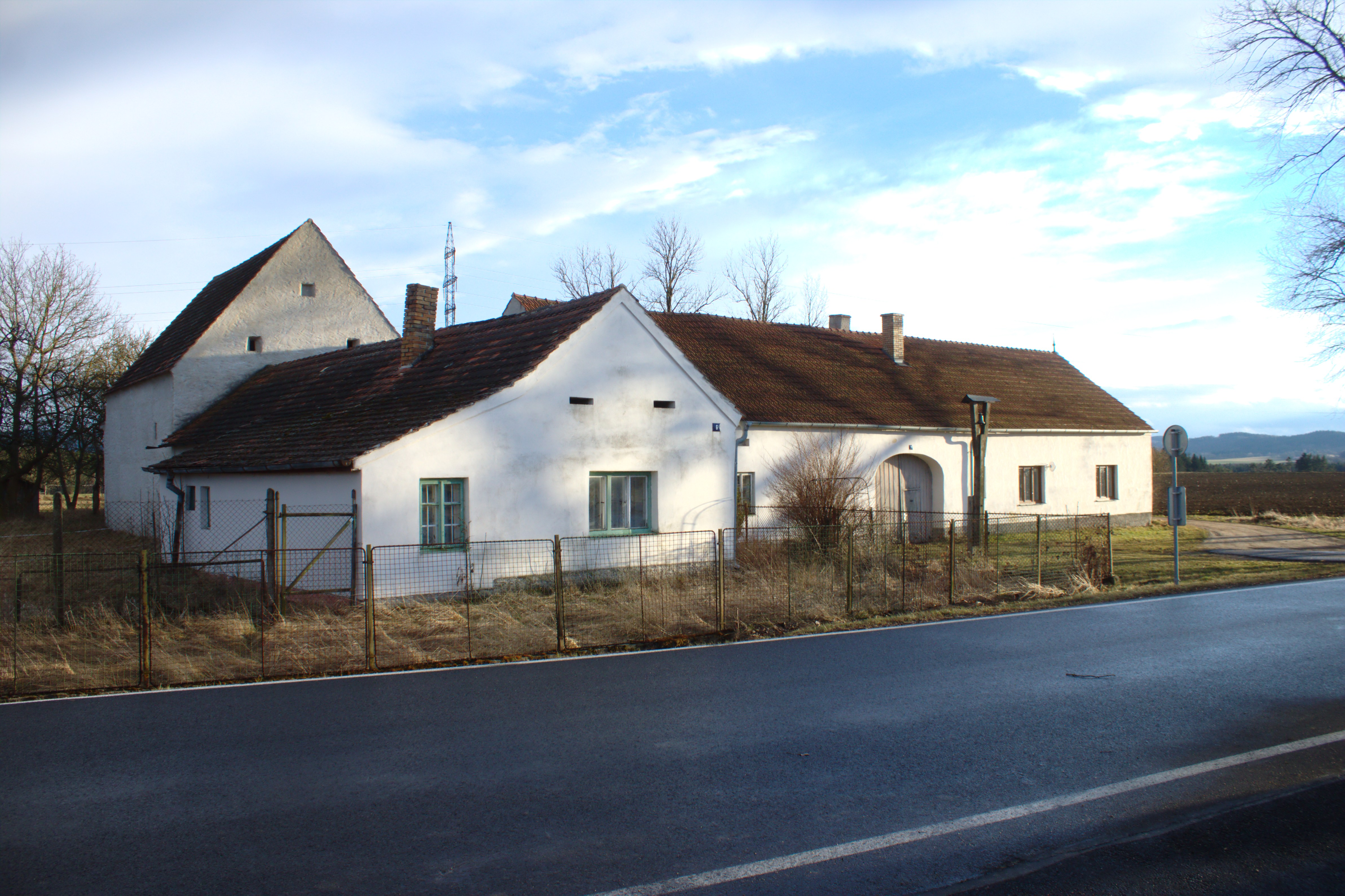 Domy ve vesnici Záhorkovice Project: Fotíme Česko